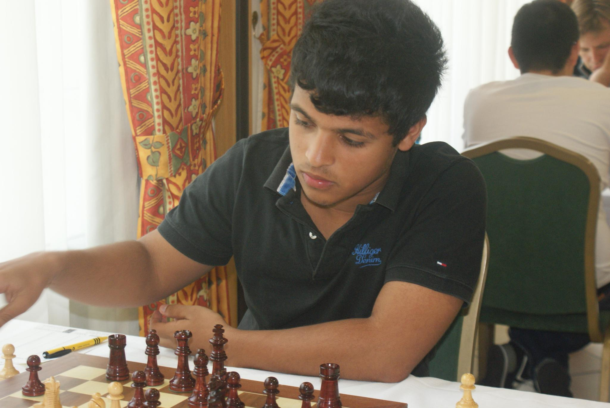 30 Open Internacional d'Andorra Hotel Sant Gothard Ronda 5 - 25/07/2012